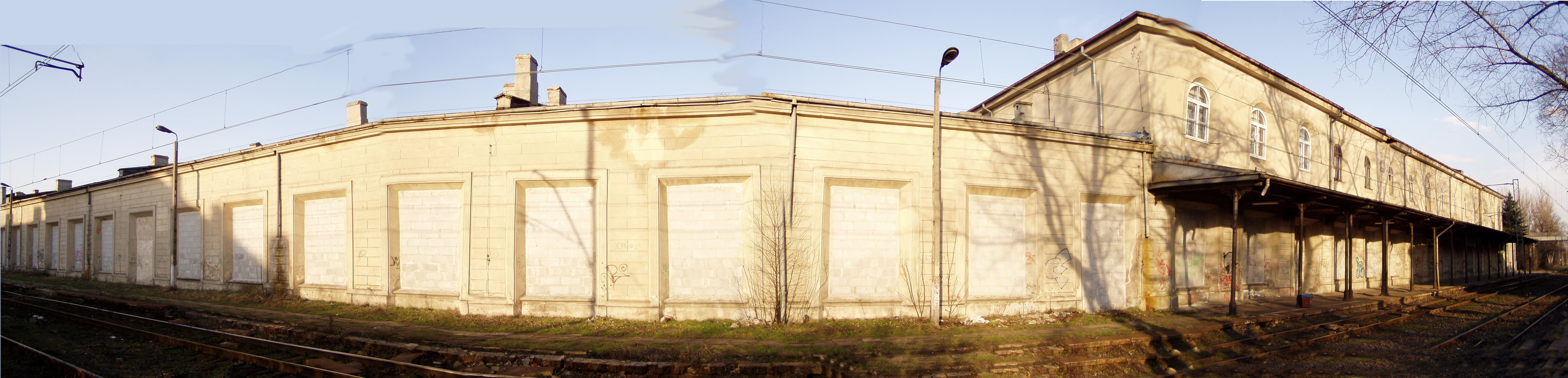 Widok współczesny stacji Maczki Contents 1 Licensing 2 Autor 3 Licensing 4 Original upload log Licensing Autor W. Grabowski